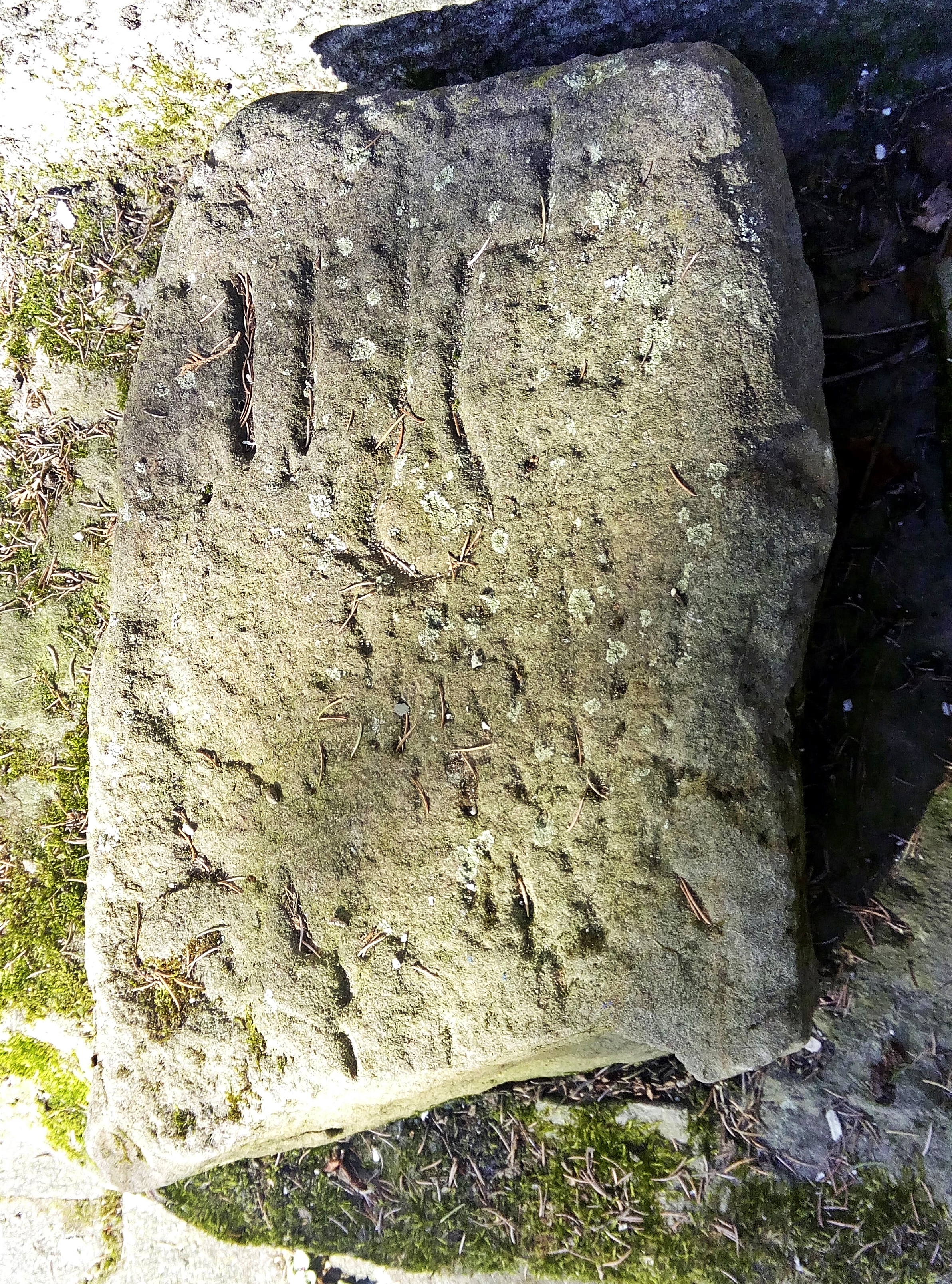 Pfeffingen, Spolie mit Schlüsseldarstellung, Hof Herrenhaus (Weingut Eymael)